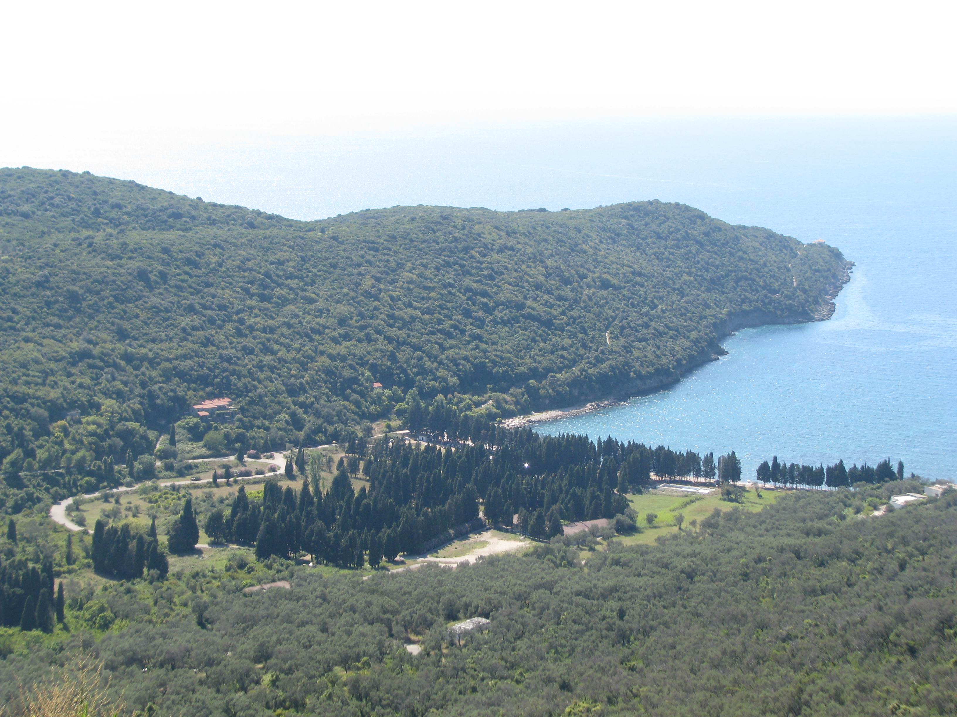 Valdanos, Crna Gora, 2011/08/13